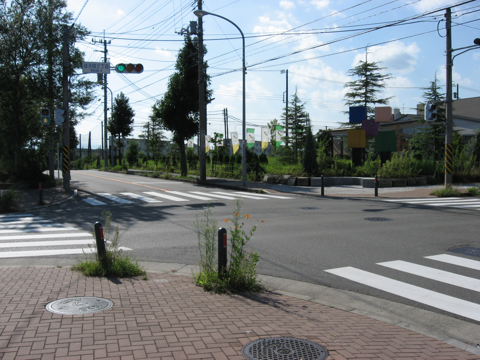 荏子田の風景